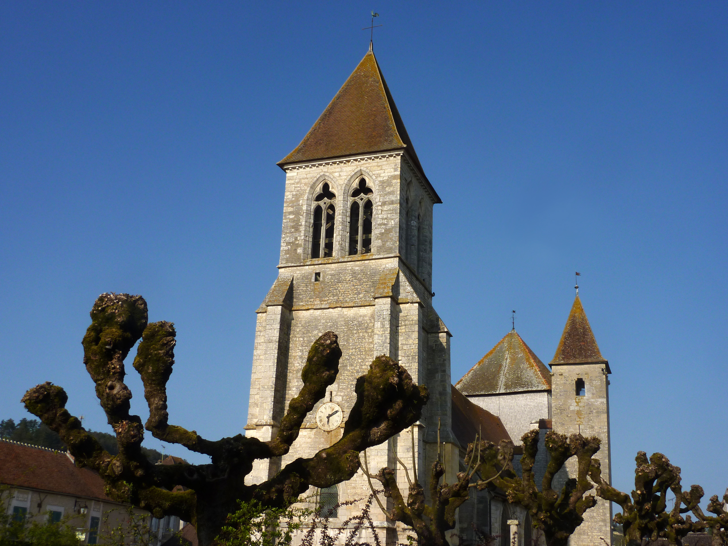 L'église de Chitry (Yonne)